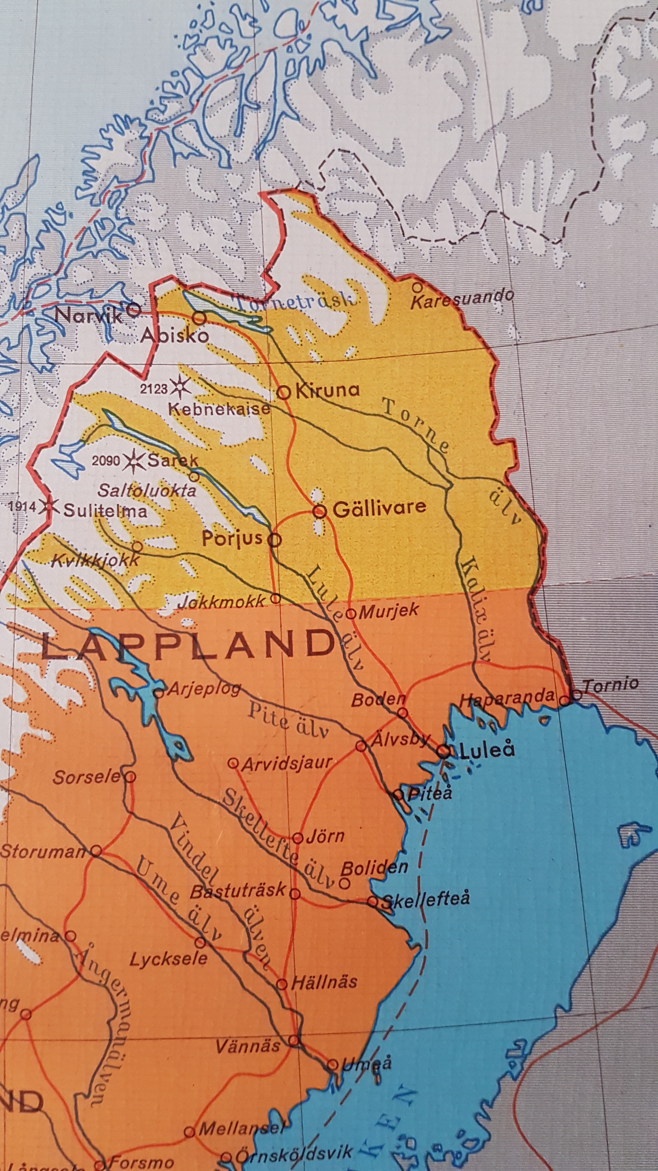 Lappland. Foto, karta för undervisning, modell äldre.